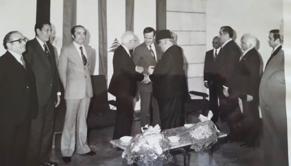 Avec le President Suleiman Franjieh et le President de la Syrie Hafez El-Assad, 7 Janvier 1975